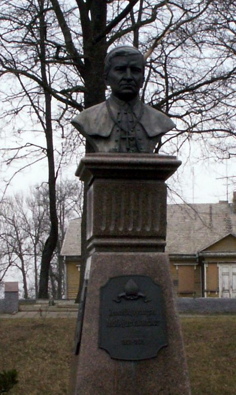 statue of Motiejus Valančius in Varniai, Lithuania